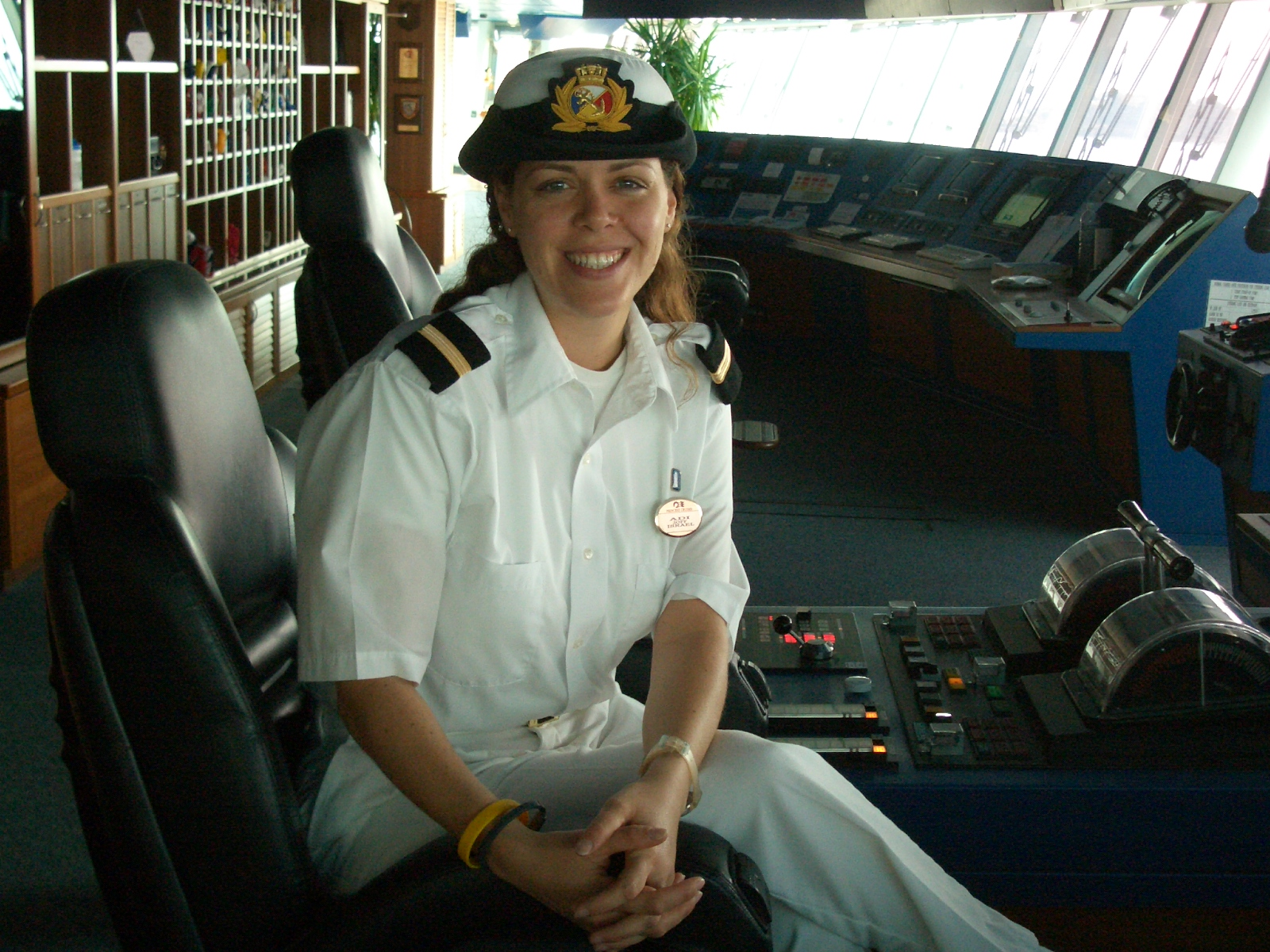 עדי אלעזרי. יוני 2005 - רגע לפני פרישה, בגשר האוניה GRAND PRINCESS